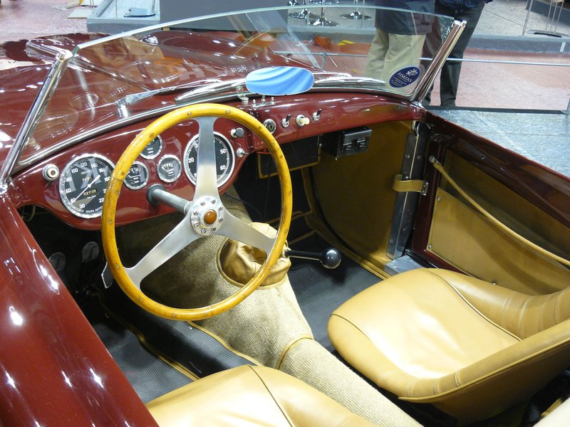 Retromobile 2012